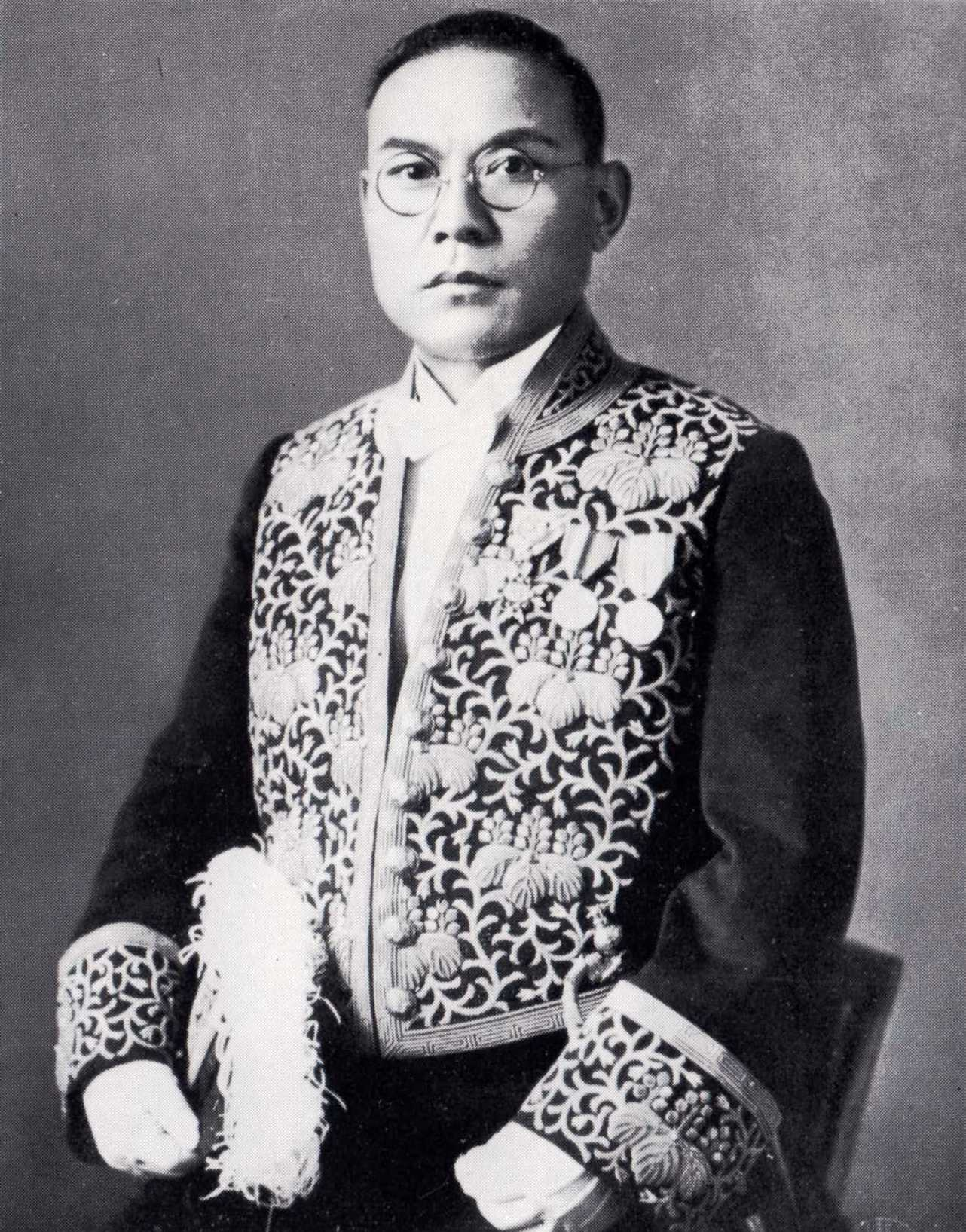 Hoshino Kiyoji is a banker of Japan